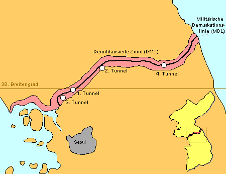 Deutsche Version, die aus der englischen Version erzeugt wurde, die der GFDL unterliegt.